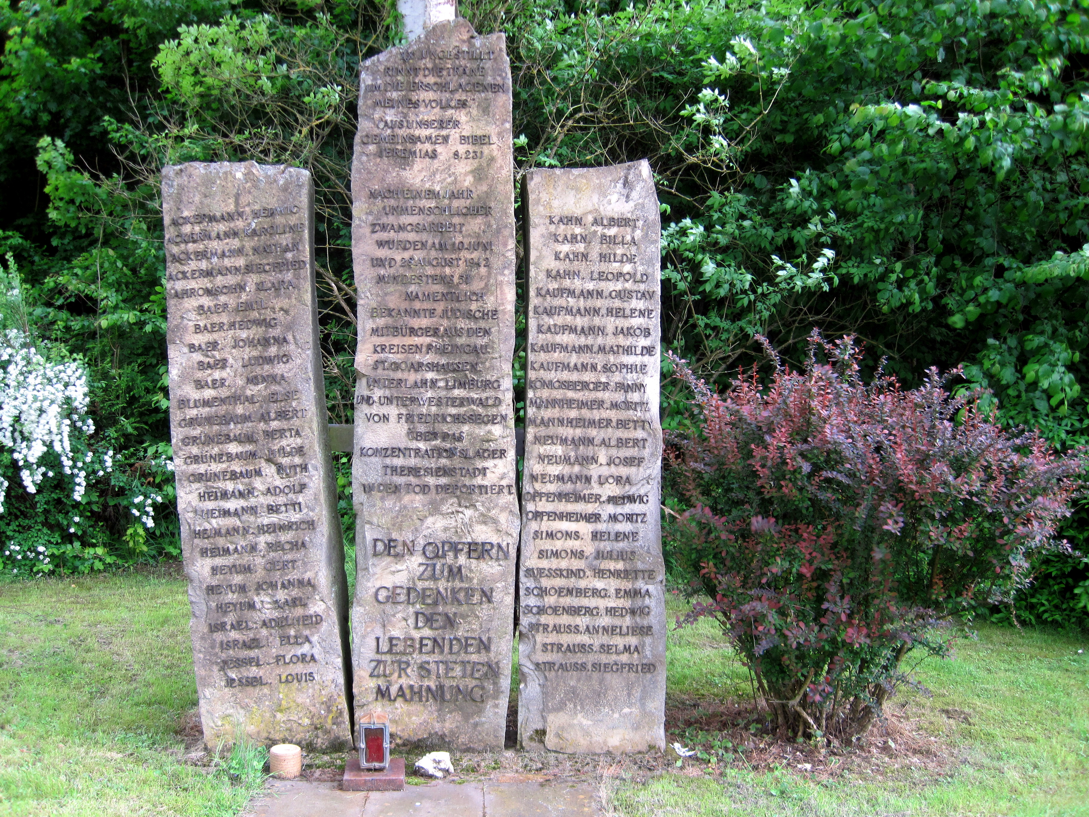 Mahnmal für jüdische Zwangsarbeiter, die zwischen 1941 und 1942 in der Werkssiedlung der ehemaligen Grube Friedrichssegen zwangsangesiedelt wurden, bevor sie in das Konzentrationslager Theresienstadt deportiert wurden. Das Mahnmal ist ein Werk des Lahnsteiner Steinbildhauers Norbert Rösner. Friedrichssegen, Ortsteil von Lahnstein, Rhein-Lahn-Kreis. Einweihung am 24. November 1996. Die Inschrift lautet: Ungestillt rinnt die Träne um die Erschlagenen meines Volkes. aus unserer gemeinsamen Bibel Jeremias 8,23 Nach einem Jahr unmenschlicher Zwangsarbeit wurden am 10. Juni und 28. August 1942 mindestens 54 namentlich bekannte jüdische Mitbürger aus den Kreisen Rheingau, St. Goarshausen, Unterlahn, Limburg und Unterwesterwald von Friedrichssegen über das Konzentrationslager Theresienstadt in den Tod deportiert. Den Opfern zum Gedenken Den Lebenden zur steten Mahnung Namen der Opfer unter Das Bundesarchiv: Gedenkbuch Opfer der Verfolgung der Juden unter der nationalsozialistischen Gewaltherrschaft in Deutschland 1933-1945 (Suche nach "Friedrichssegen" und "Deportationsort")